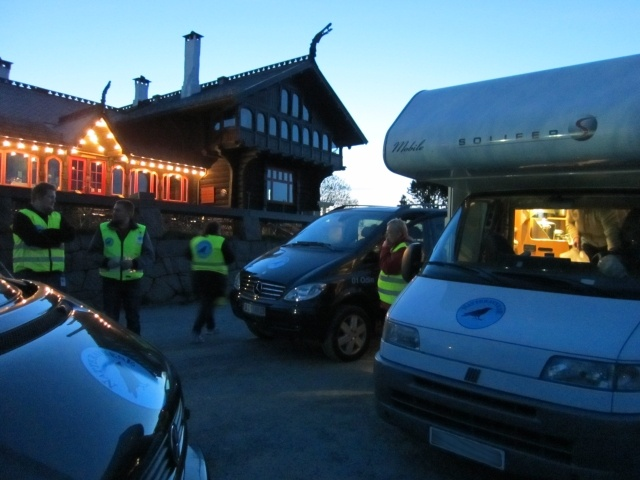 Natteravnene på Tryvann under russetiden 2011.